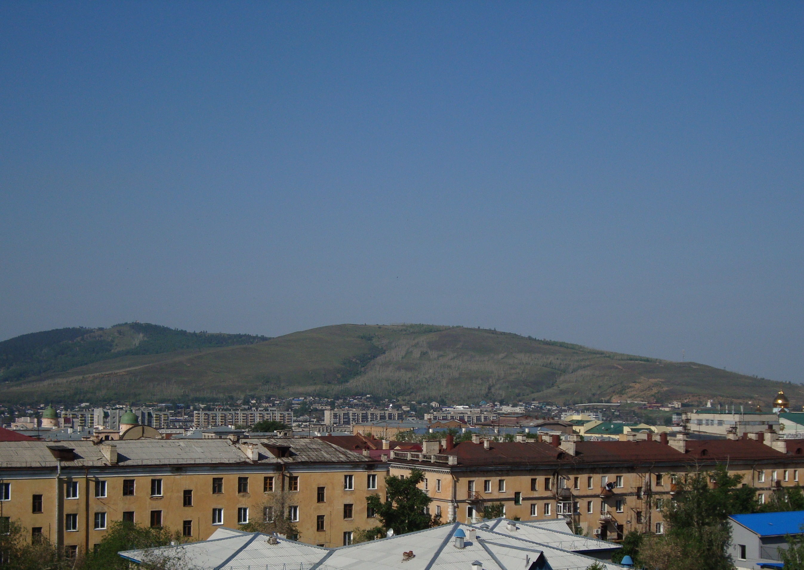 Чита у подножия Титовской Сопки